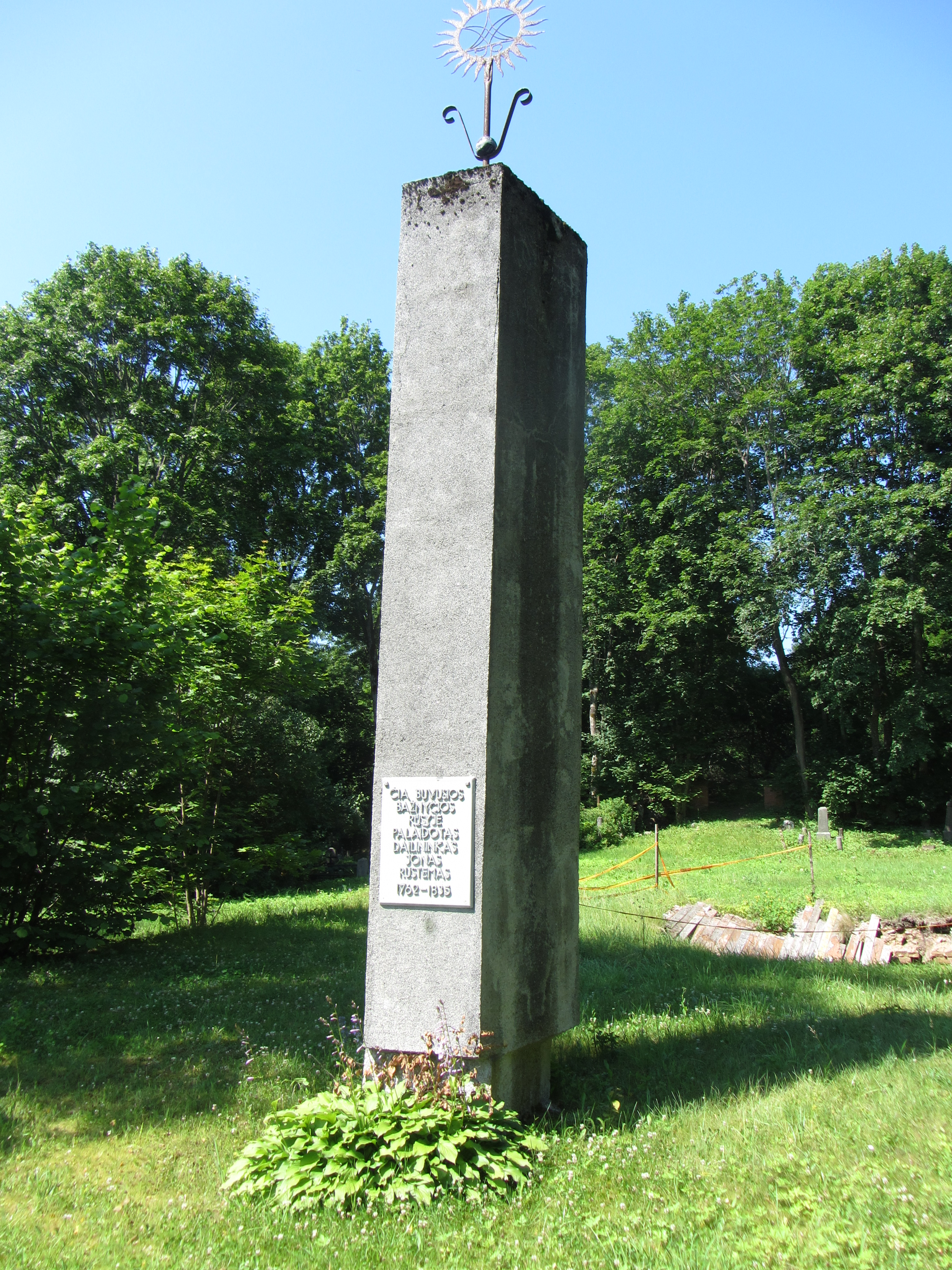 Dūkšteliai, Lithuania